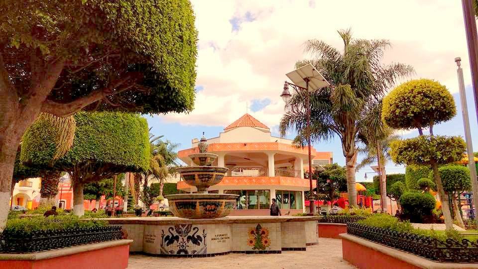 Parque de San Pablo del Monte, Tlaxcala